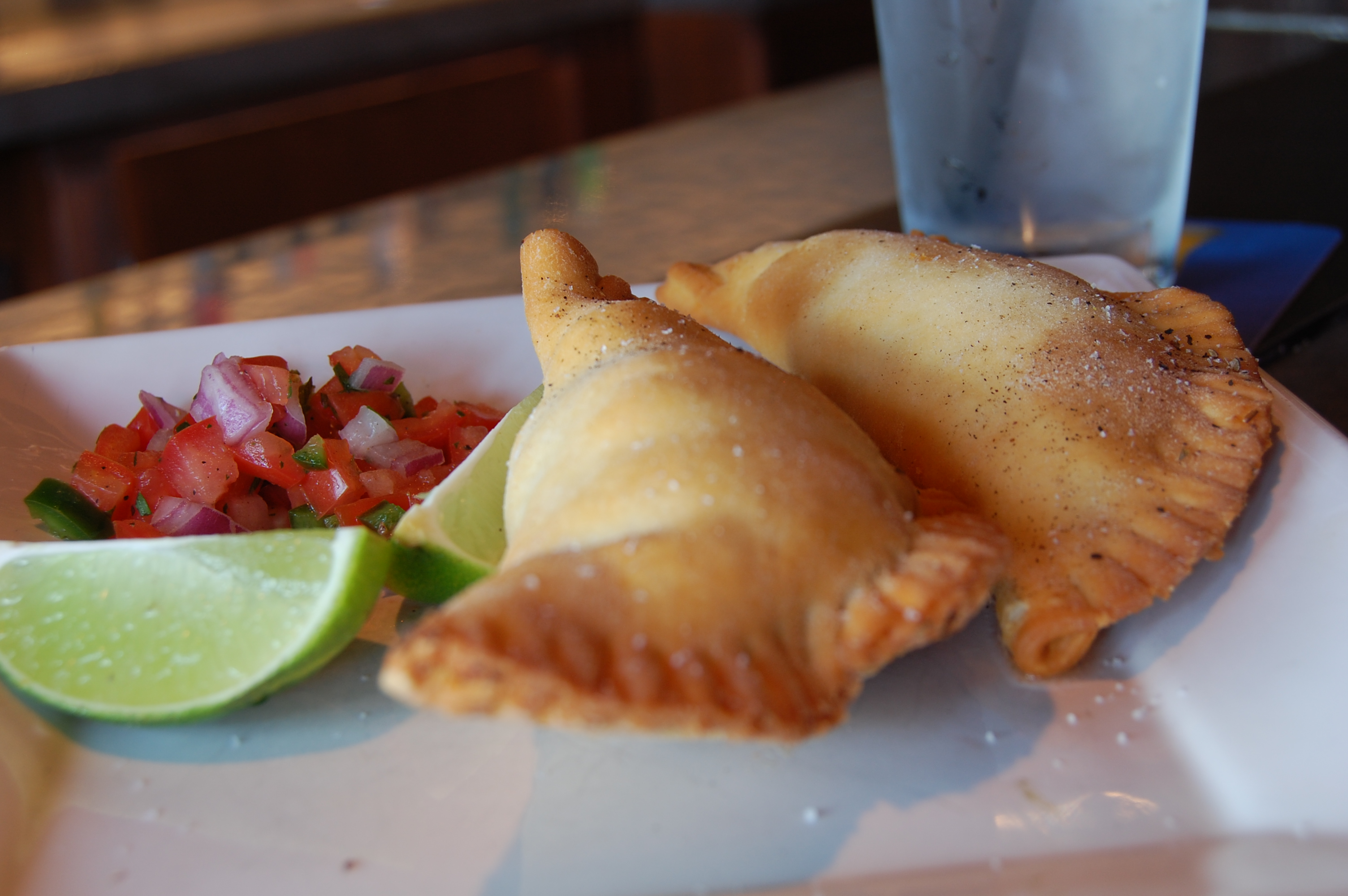 a empanadas